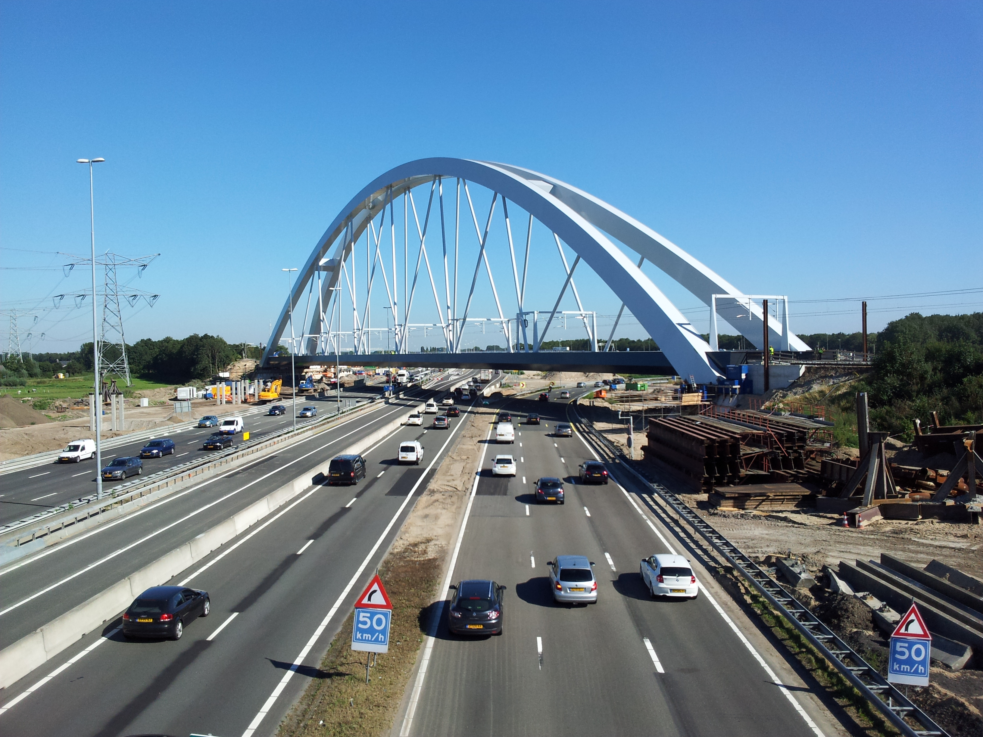 Augustus 2016: portalen voor de bovengeleiding zijn geplaatst en de brug is naar de definitieve locatie verschoven. De oude spoorbrug is verwijderd.